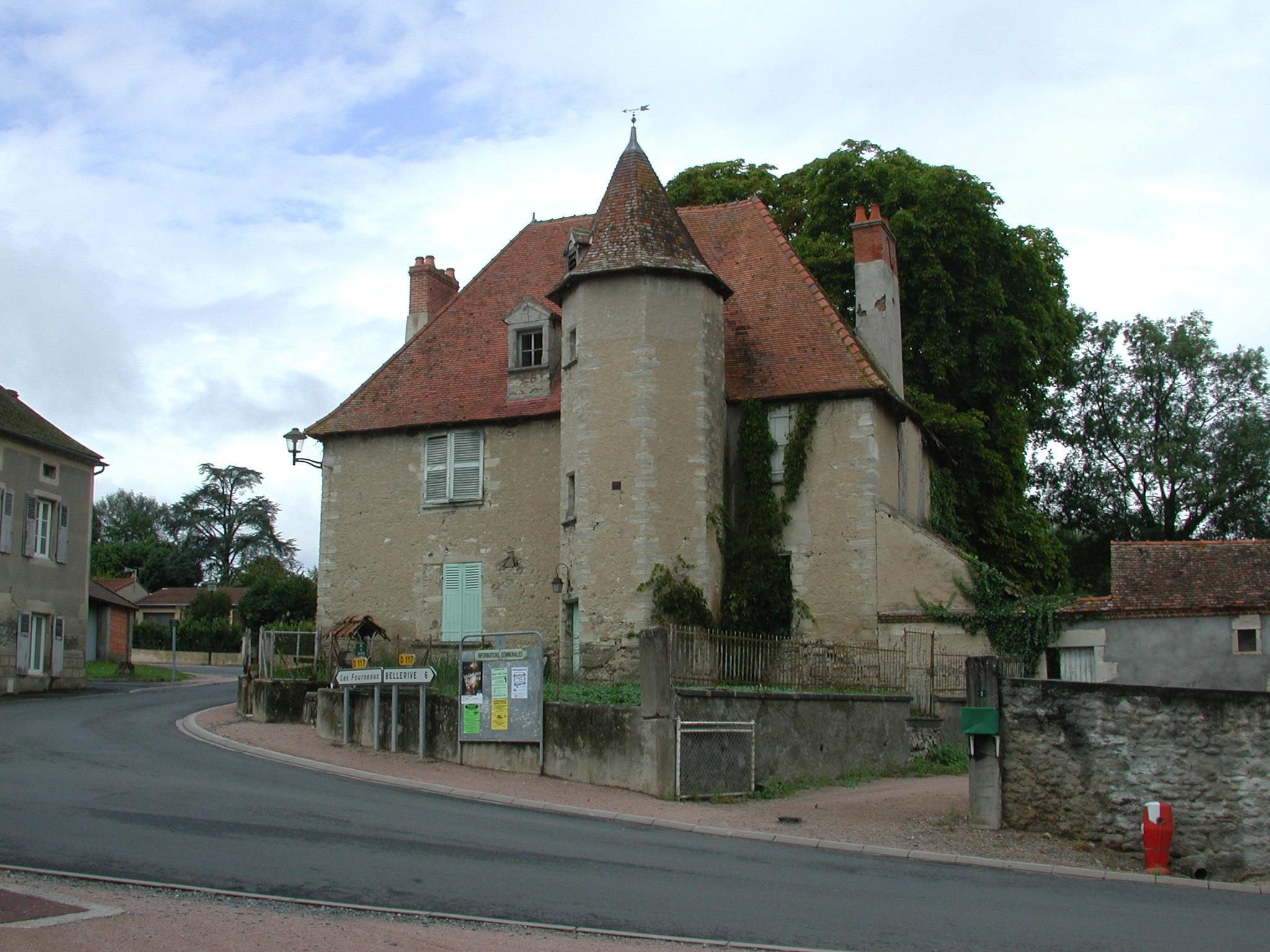 Brugheas (Allier, France). Ancien collège. 2008.